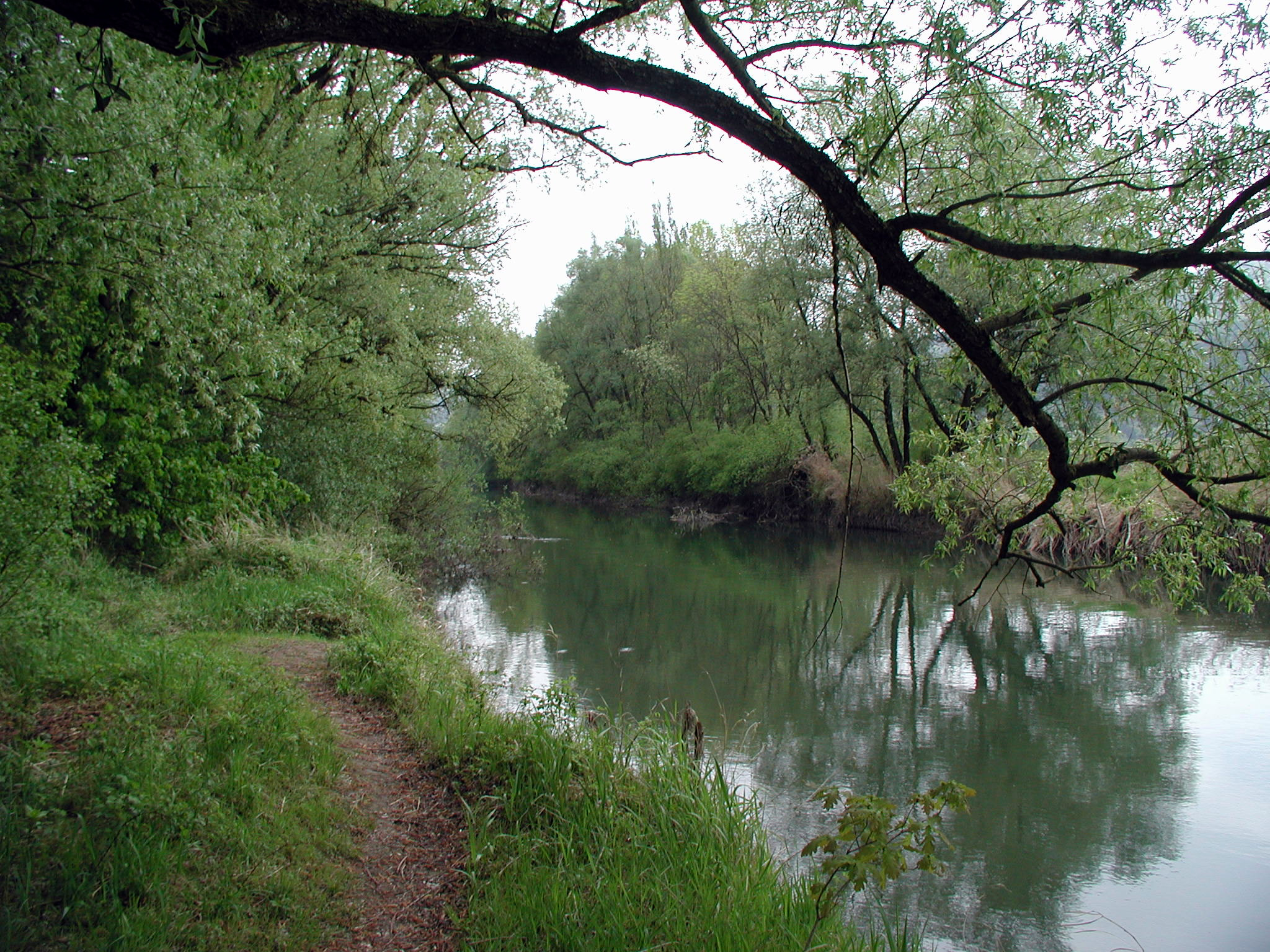 Der Rhein in Höchst